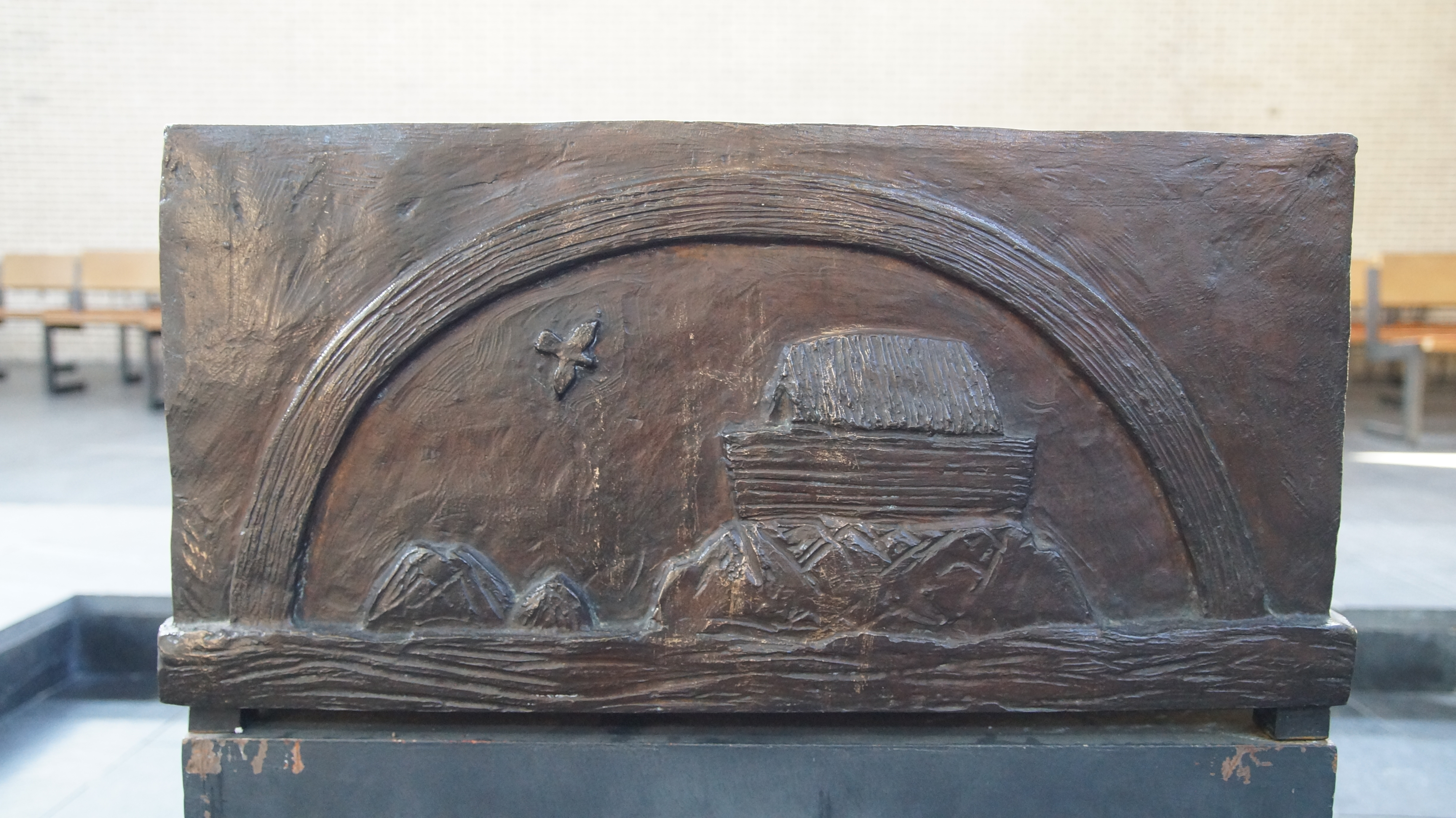 Arche Noah - Buch Genesis, Kapitel 6–9